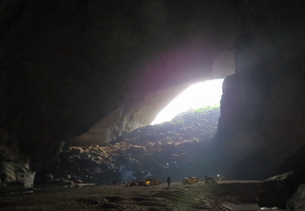 Son Doong-17